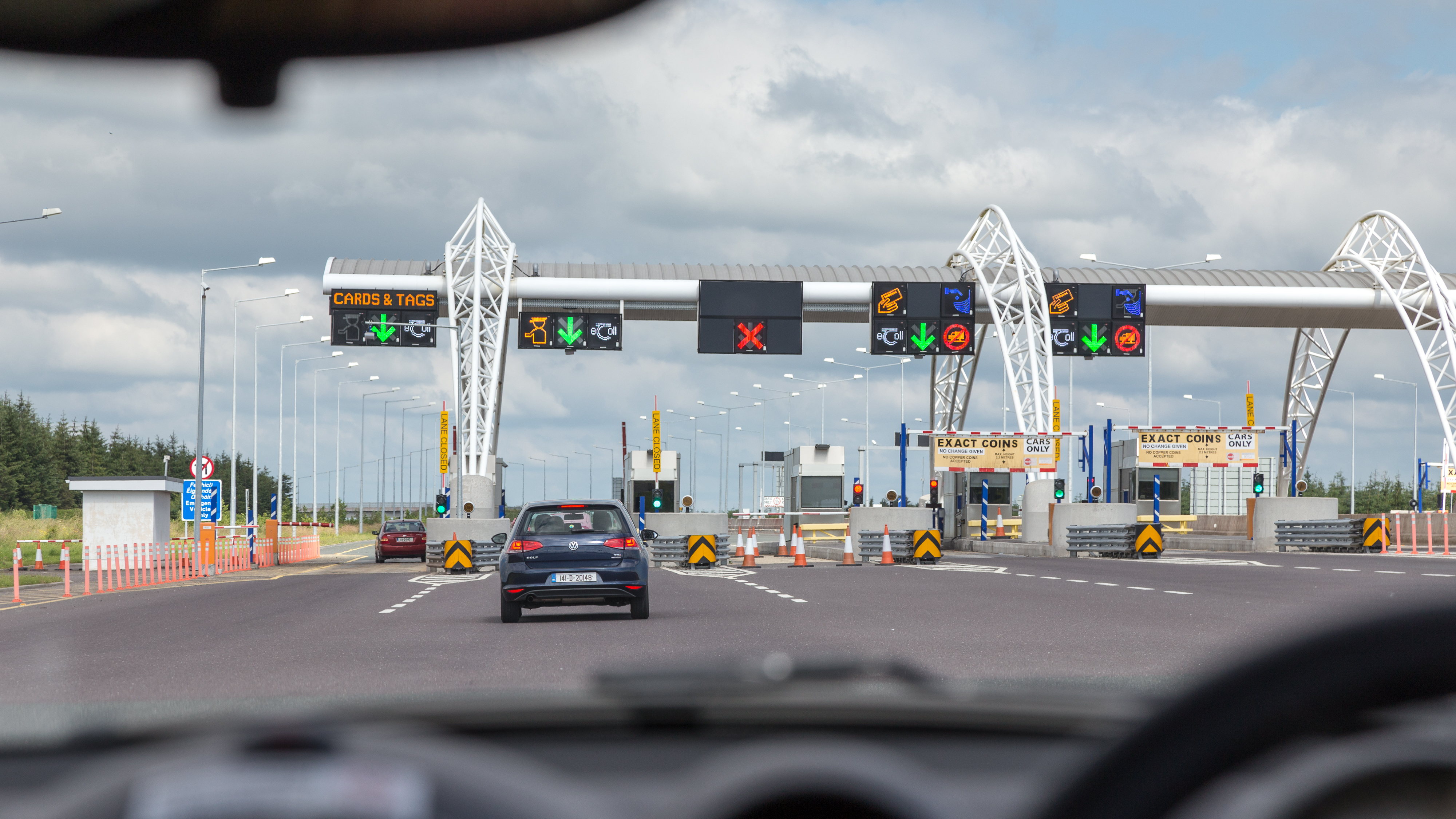 Mautstation auf der Autobahn nach Dublin